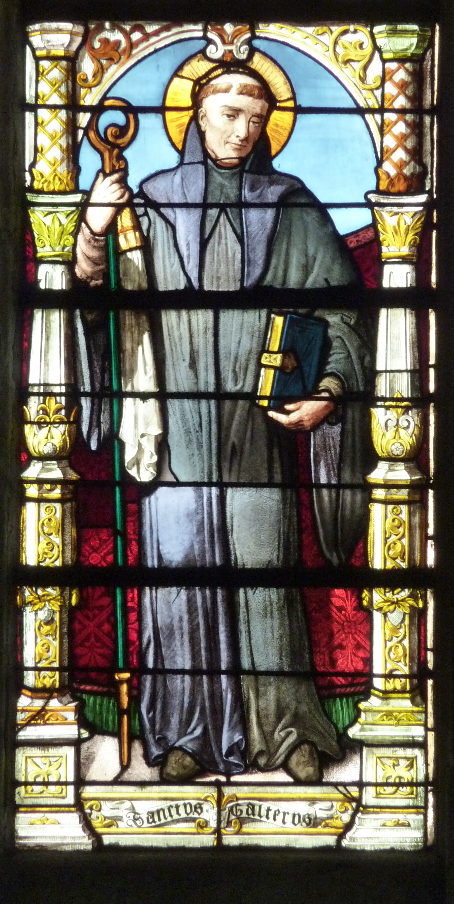 Bleiglasfenster (Ausschnitt) in der Kathedrale Saint-Maclou in Pontoise, Darstellung: hl. ?